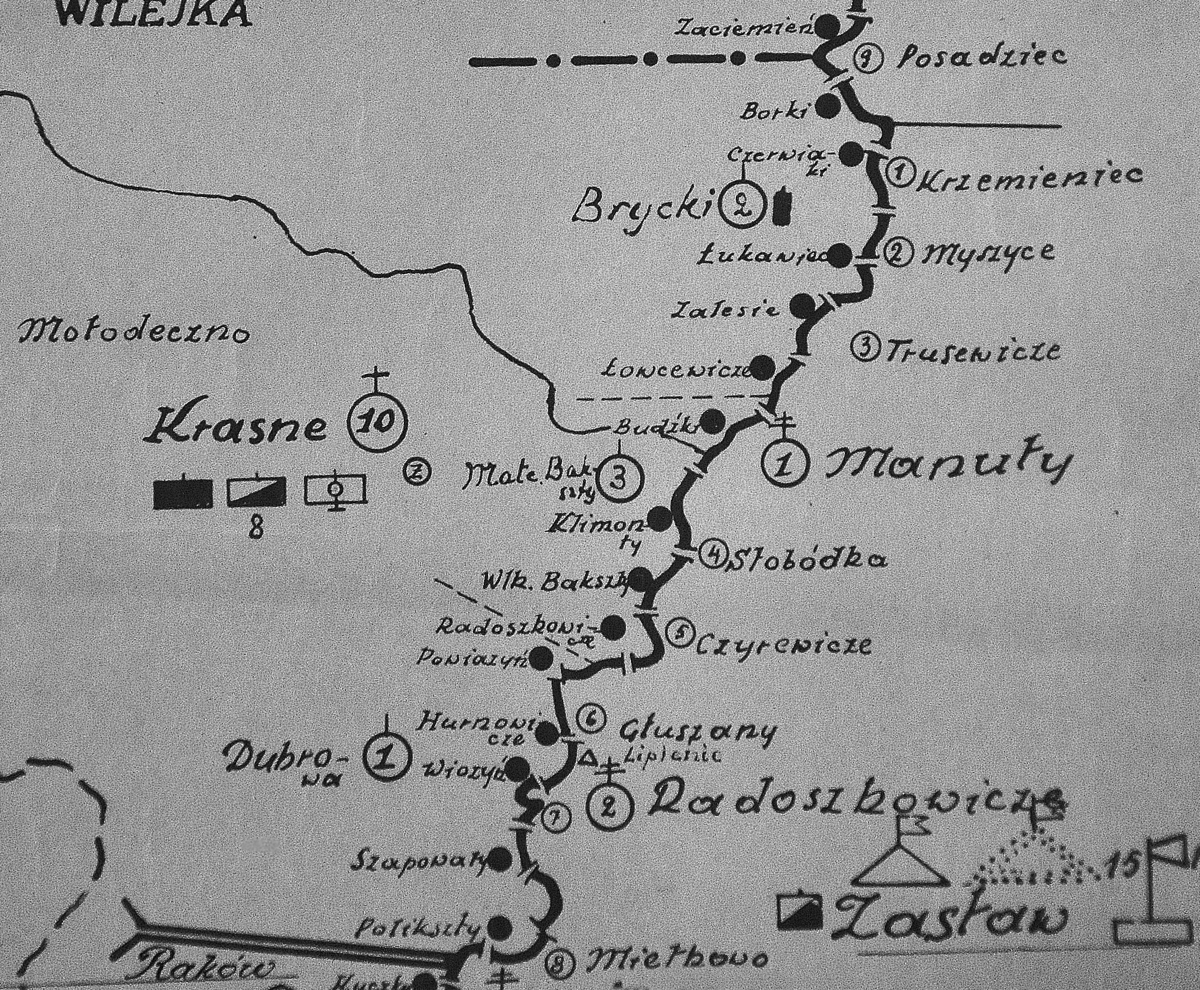 Szkic rozmieszczenia batalionu KOP Krasne w 1931